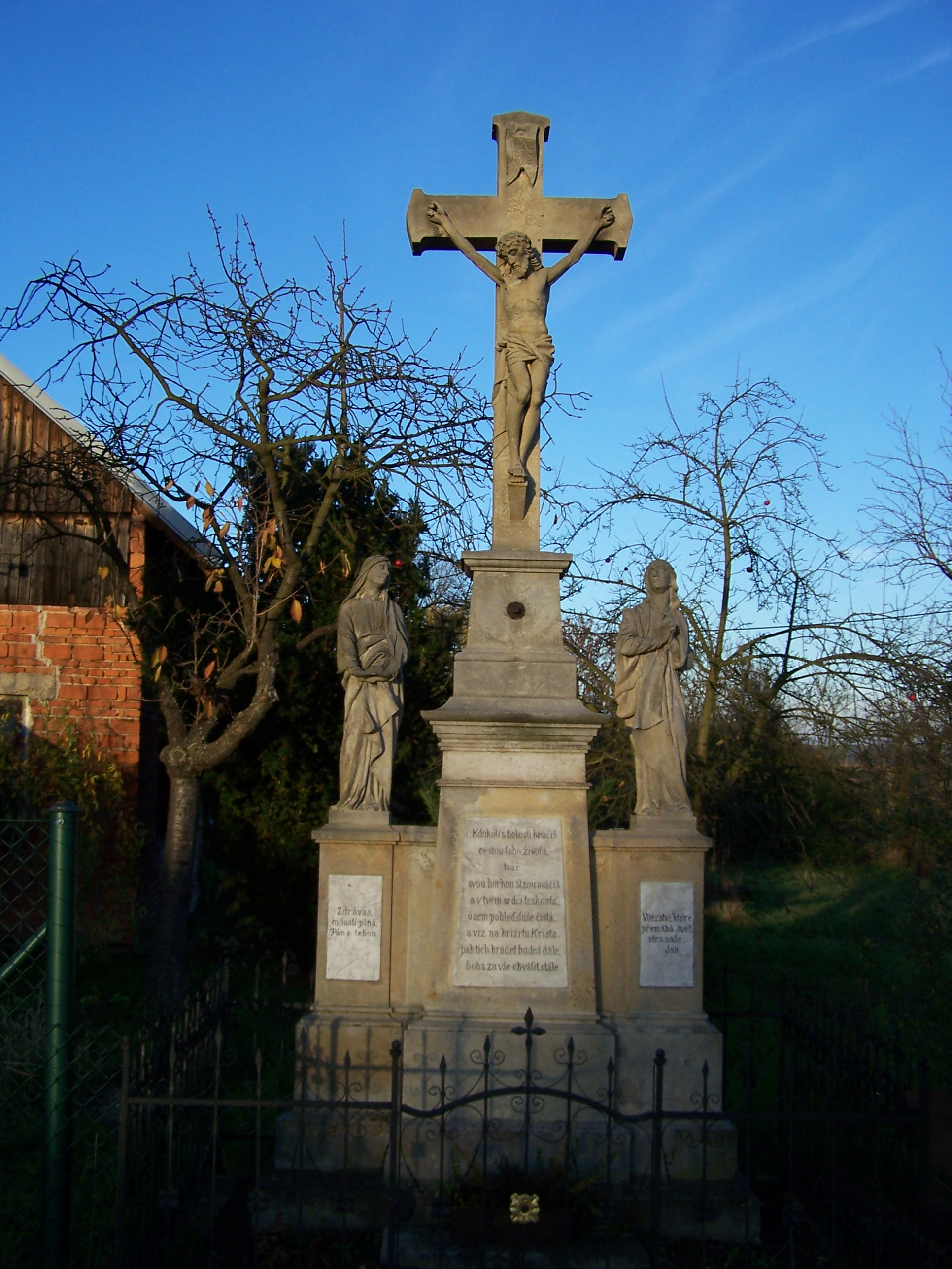 Kříž v Dolním Černilově (okres Hradec Králové)